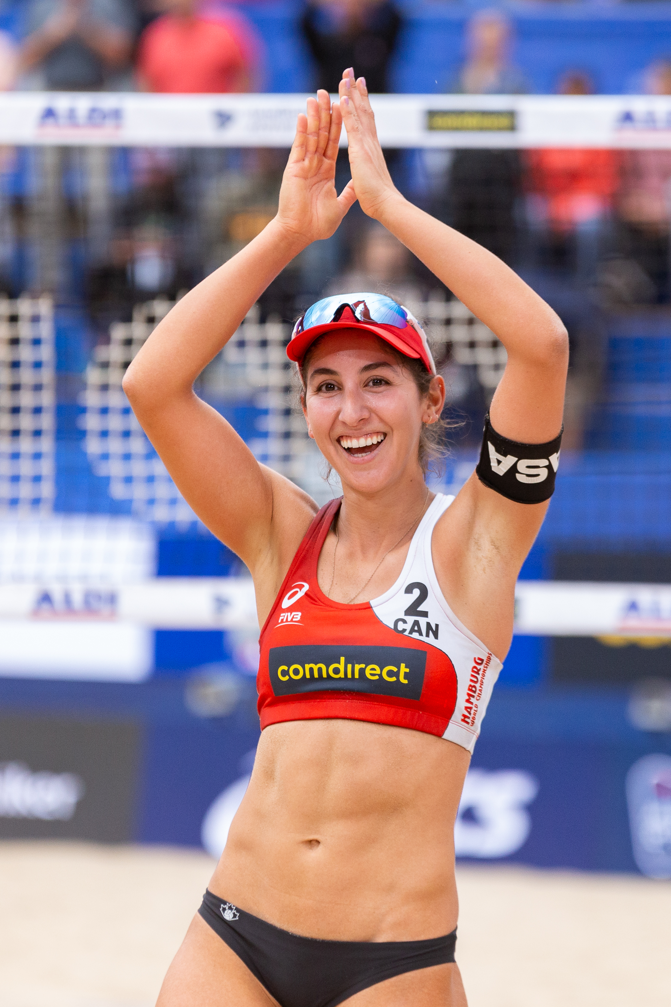 BeachVolleyball Weltmeisterschaft Hamburg 2019; Melissa Humana-Paredes (CAN, Kanada); Jubel, celebration über den Sieg im Achtelfinale